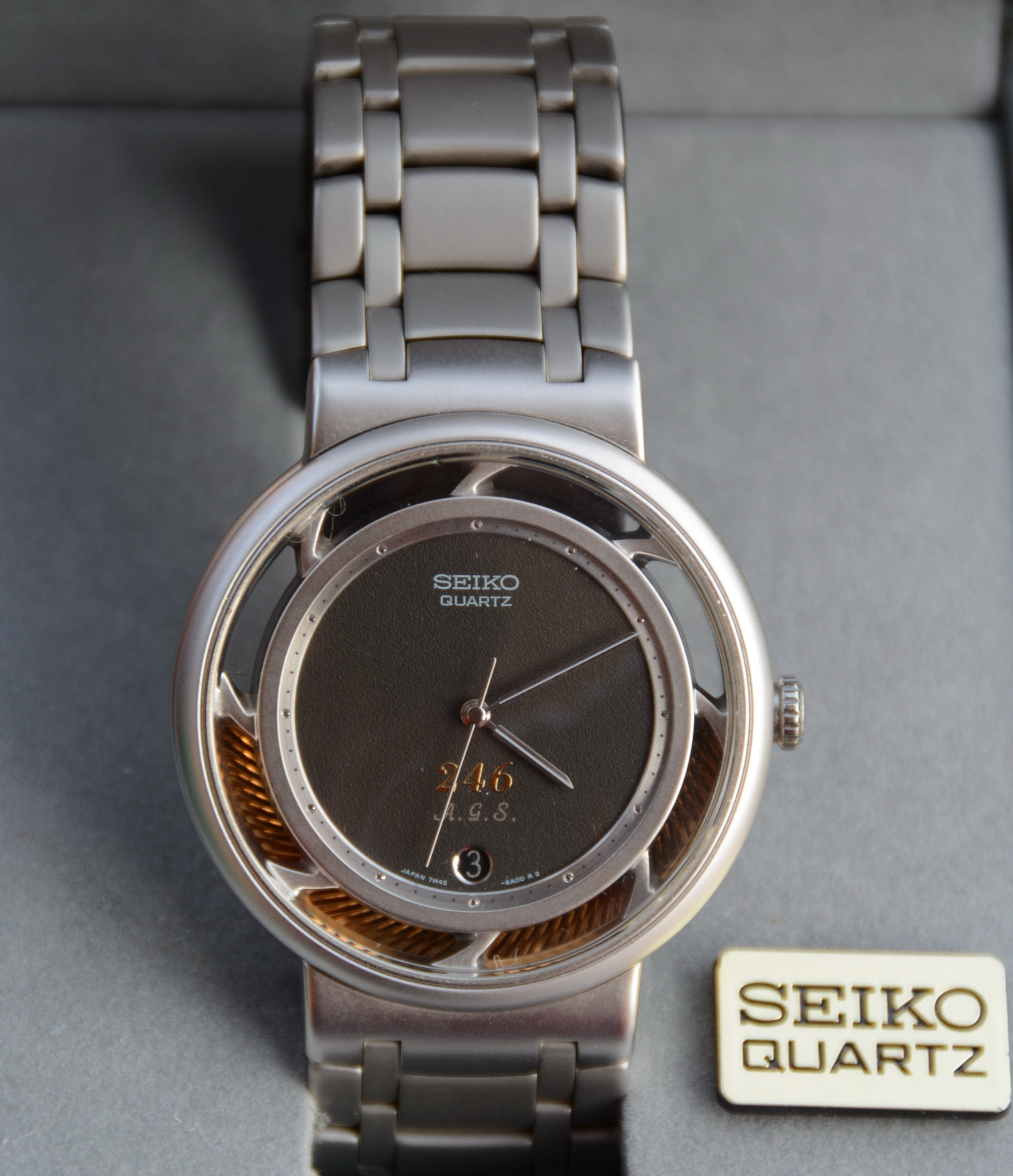 Seiko Quartz Automatic Generating System, Sondermodell "Perpetuum Nobile", Cal. 7M45, Nr. 246 von 700